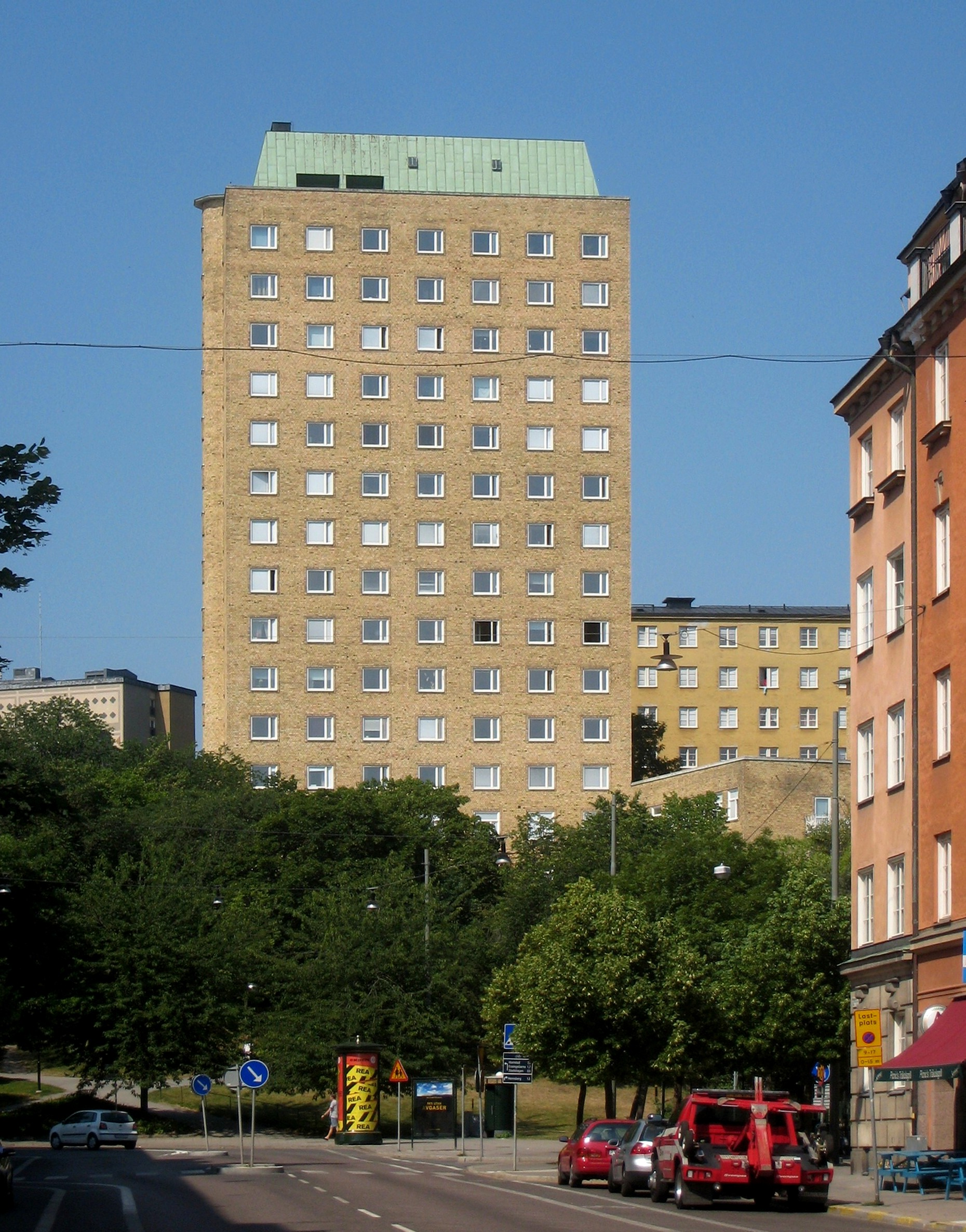 Kvinnohuset sett från Fleminggatan.